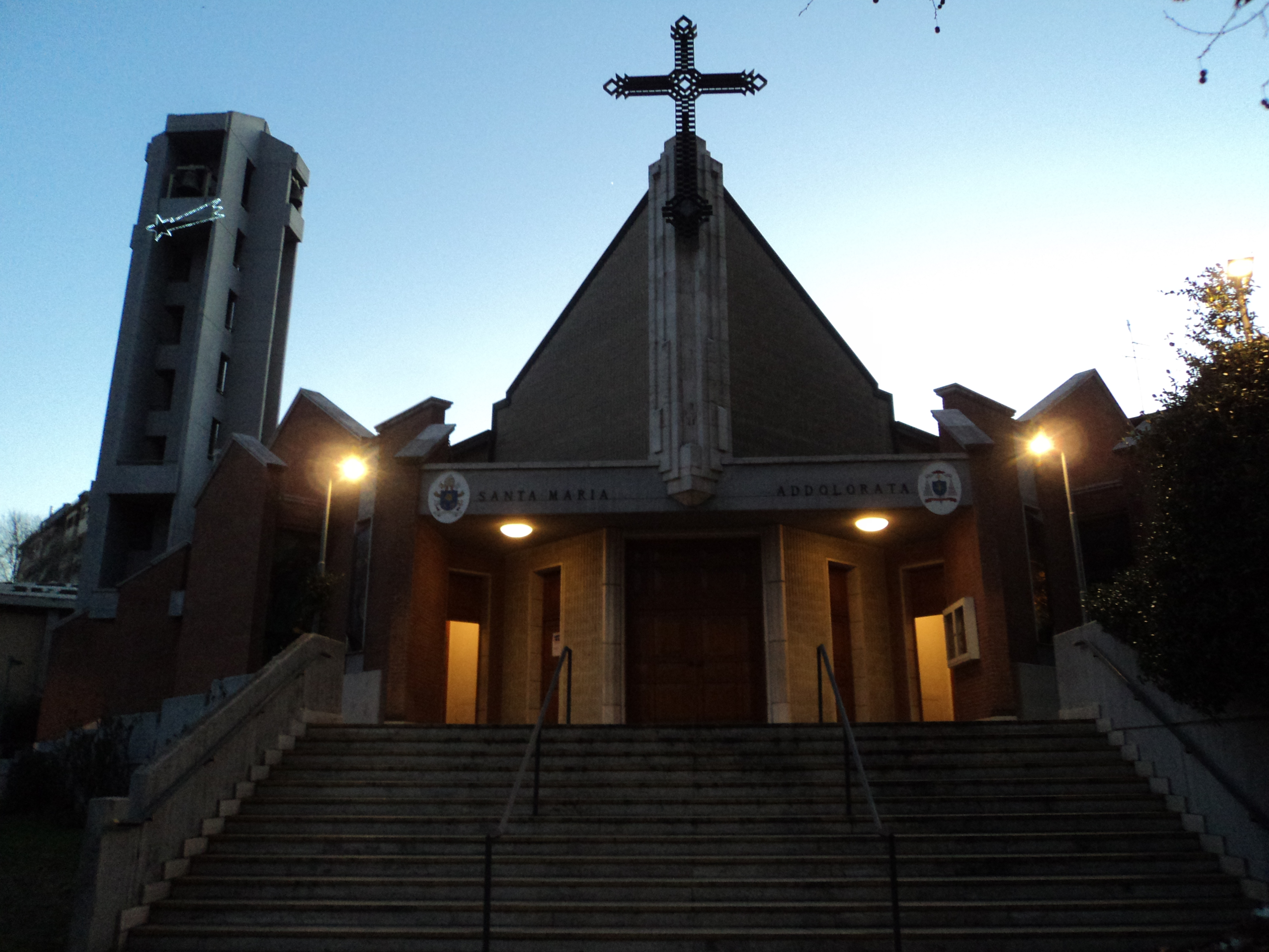 Chiesa di Santa Maria Addolorata (Roma)